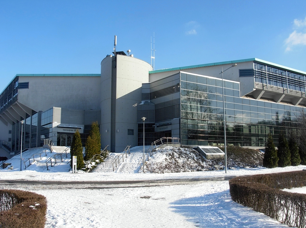 Hala widowiskowo-sportowa Łuczniczka w Bydgoszczy